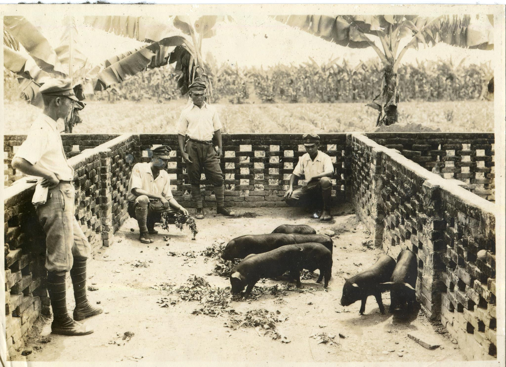 高雄州立屏東中學校學生以地瓜葉餵養豬隻。